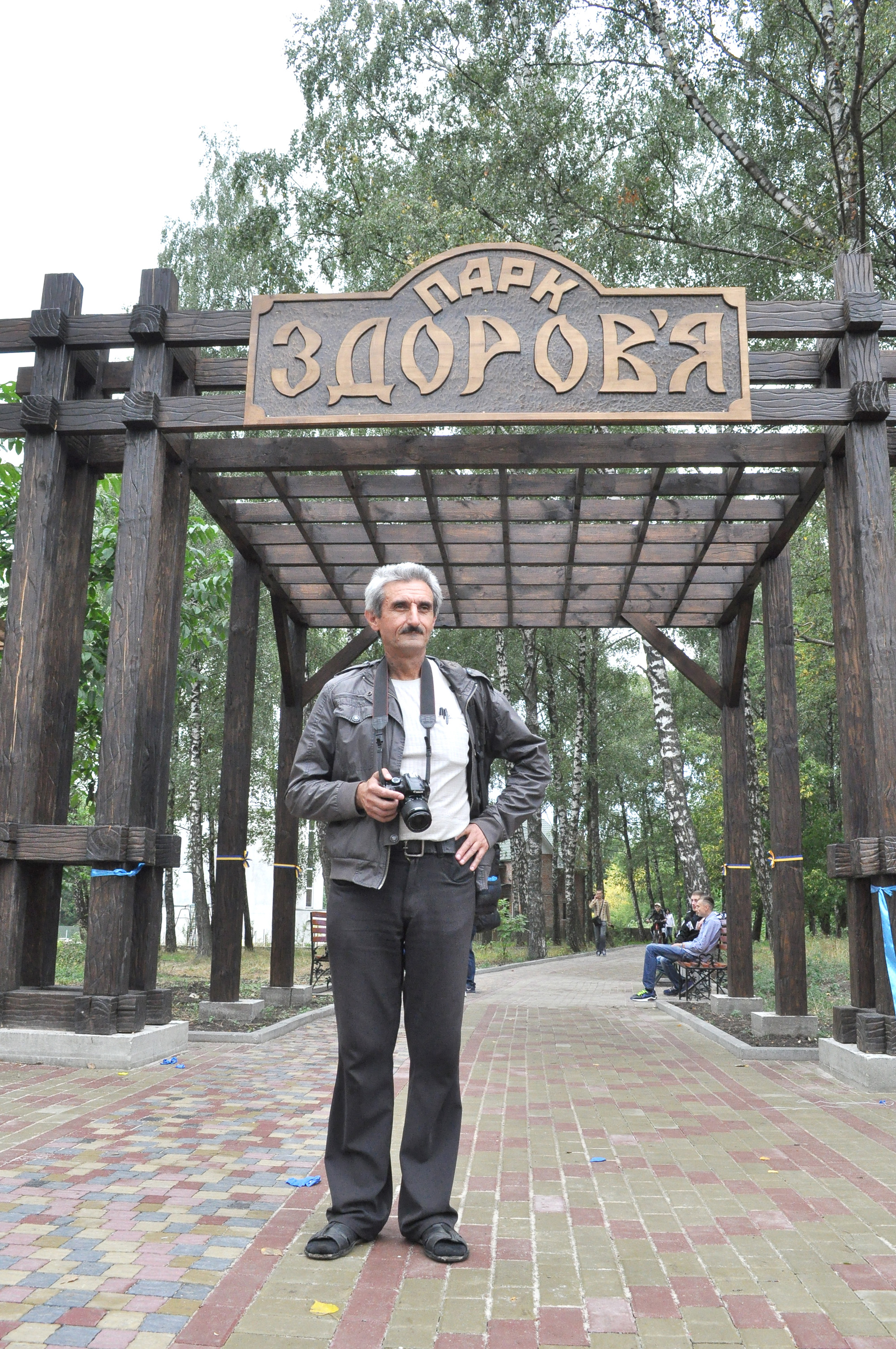 Відкриття Парк Здоров'я у Тернополі. Фотокореспондент Іван Пшоняк.